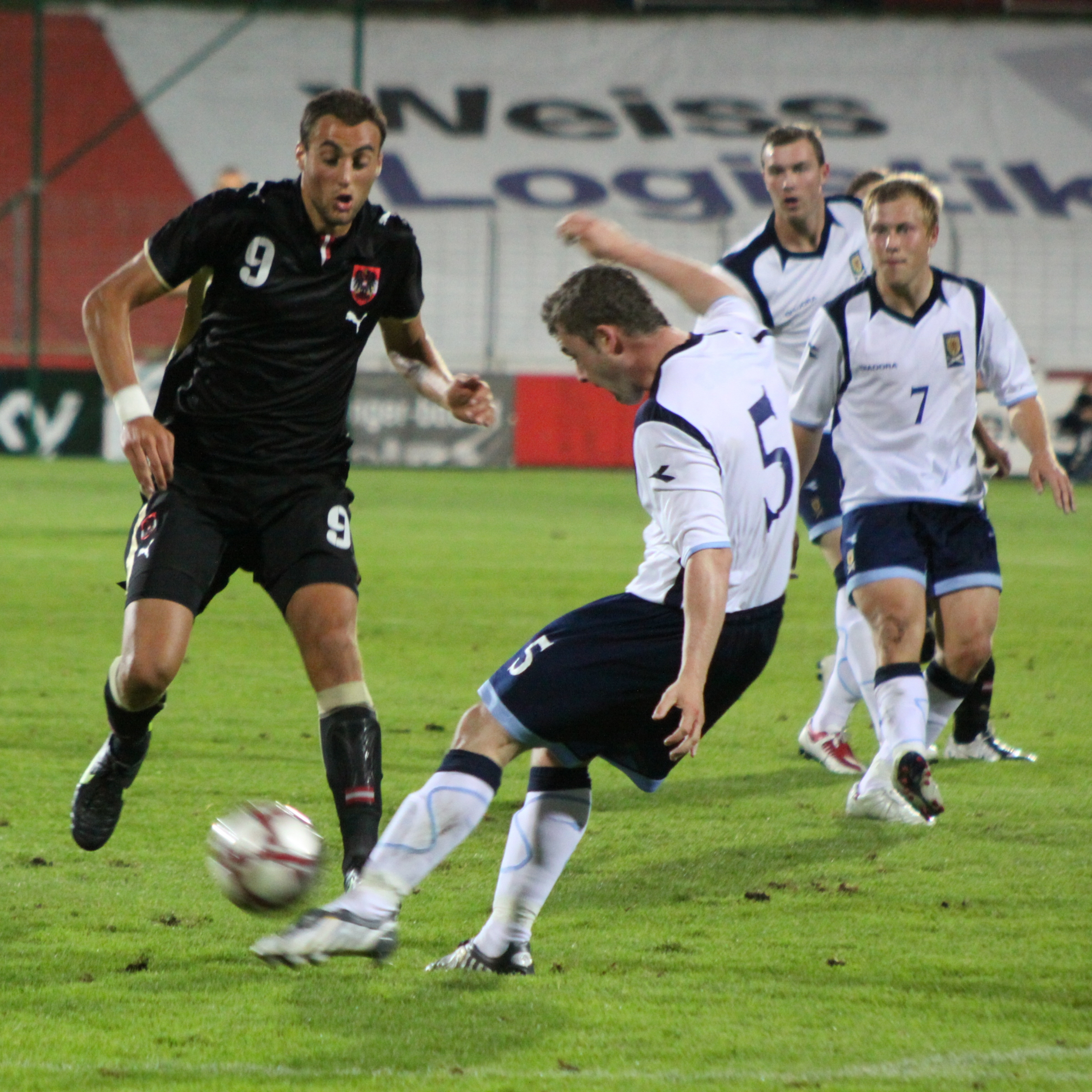 Thomas Scobbie (Nr. 5, FC Falkirk) - Schottische Fußballnationalmannschaft (U-21-Männer) Thomas Scobbie (#5, Falkirk F.C.) - Scotland national under-21 football team — (2)